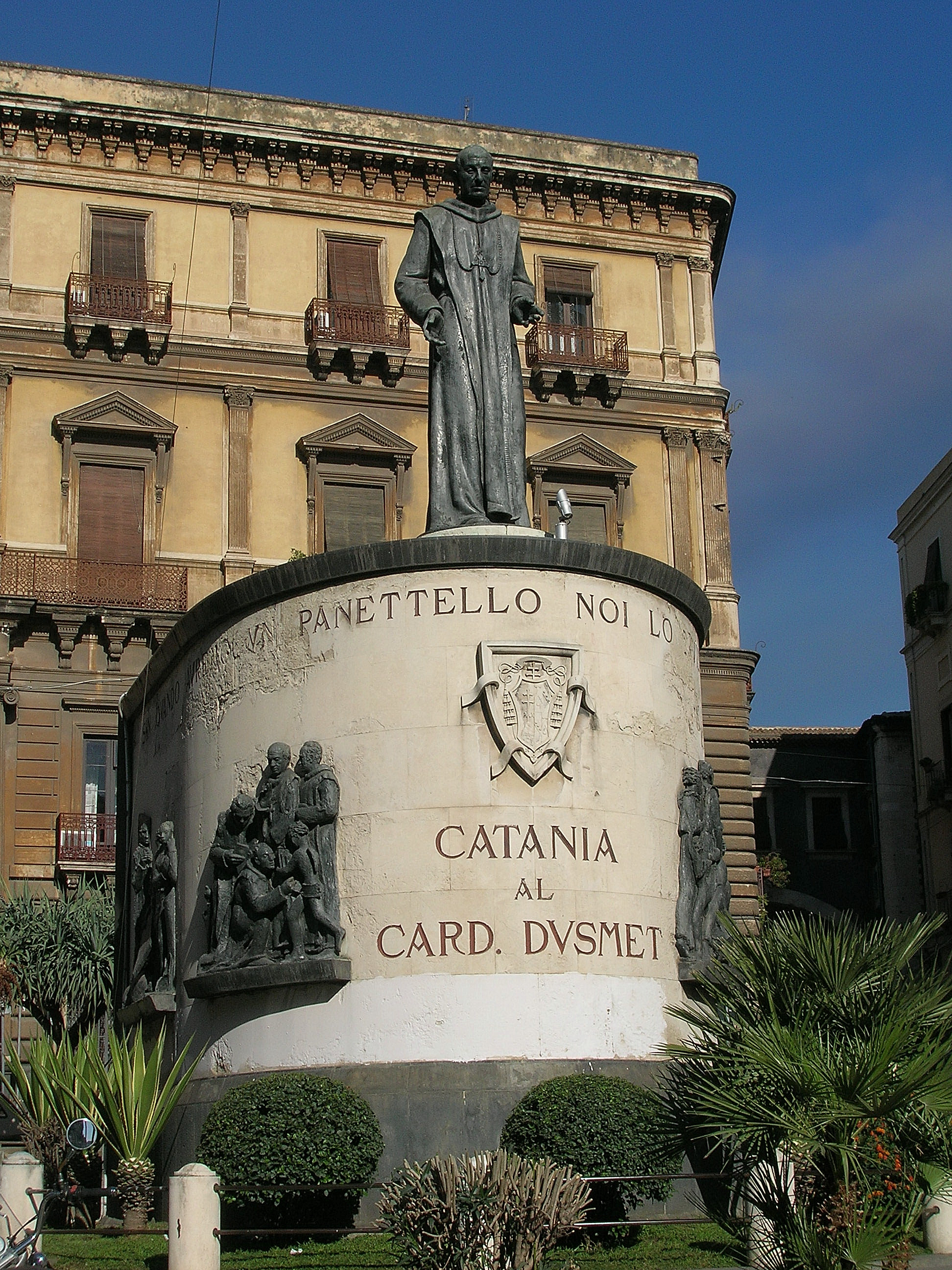 Monumento a Dusmet, Catania (1935): progetto di Raffaele Leone, statua di Silvestre Cuffaro, altorilievi di Mimì Maria Lazzaro